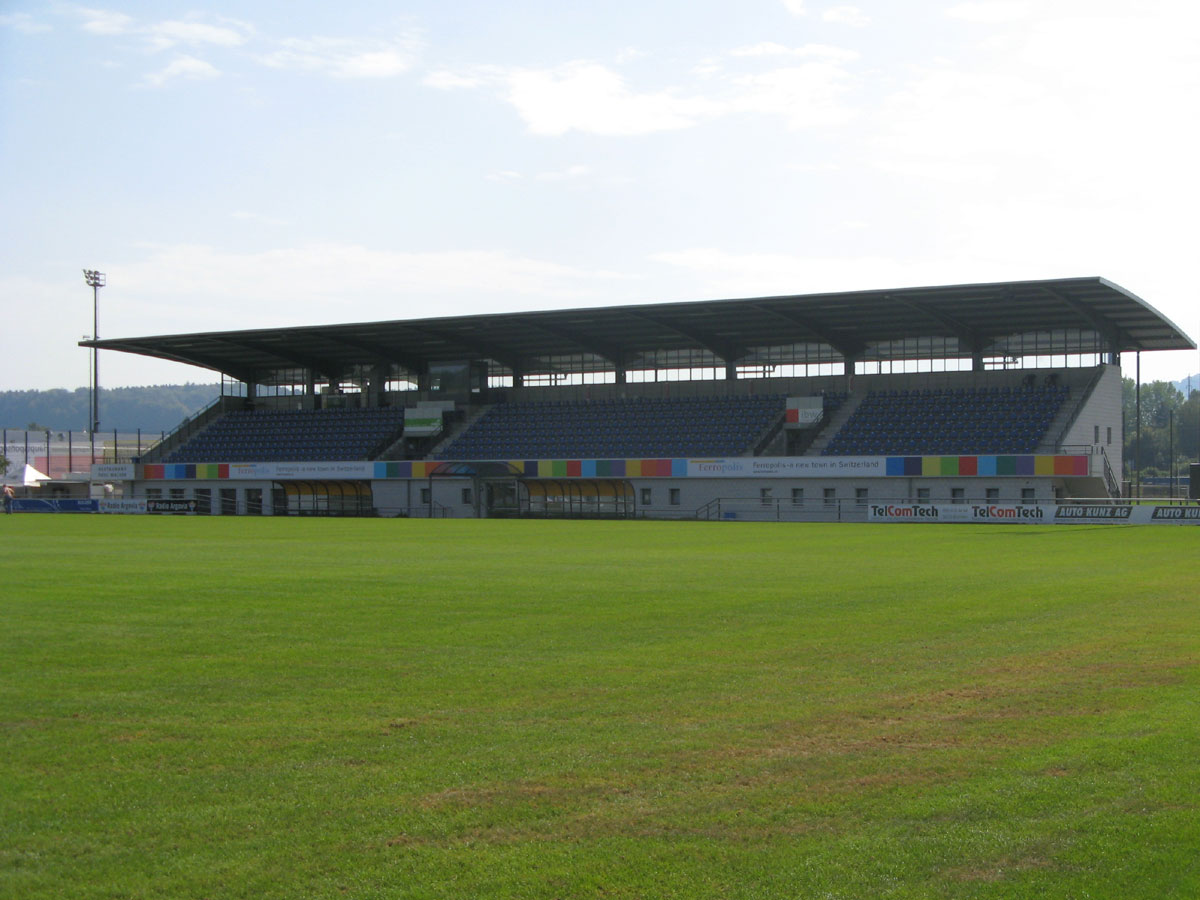 Fussballstadion Niedermatten in Wohlen